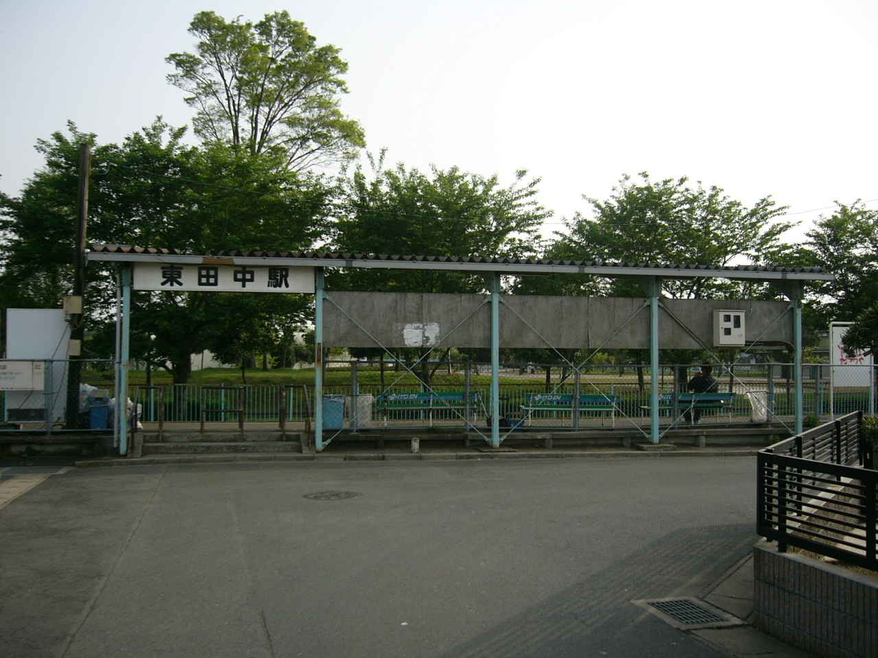 Higashitanaka Station